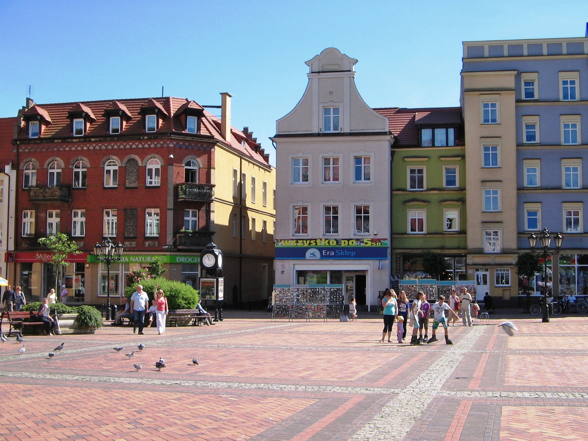 Kamienice starego miasta usytuowane przy rynku miejskim.